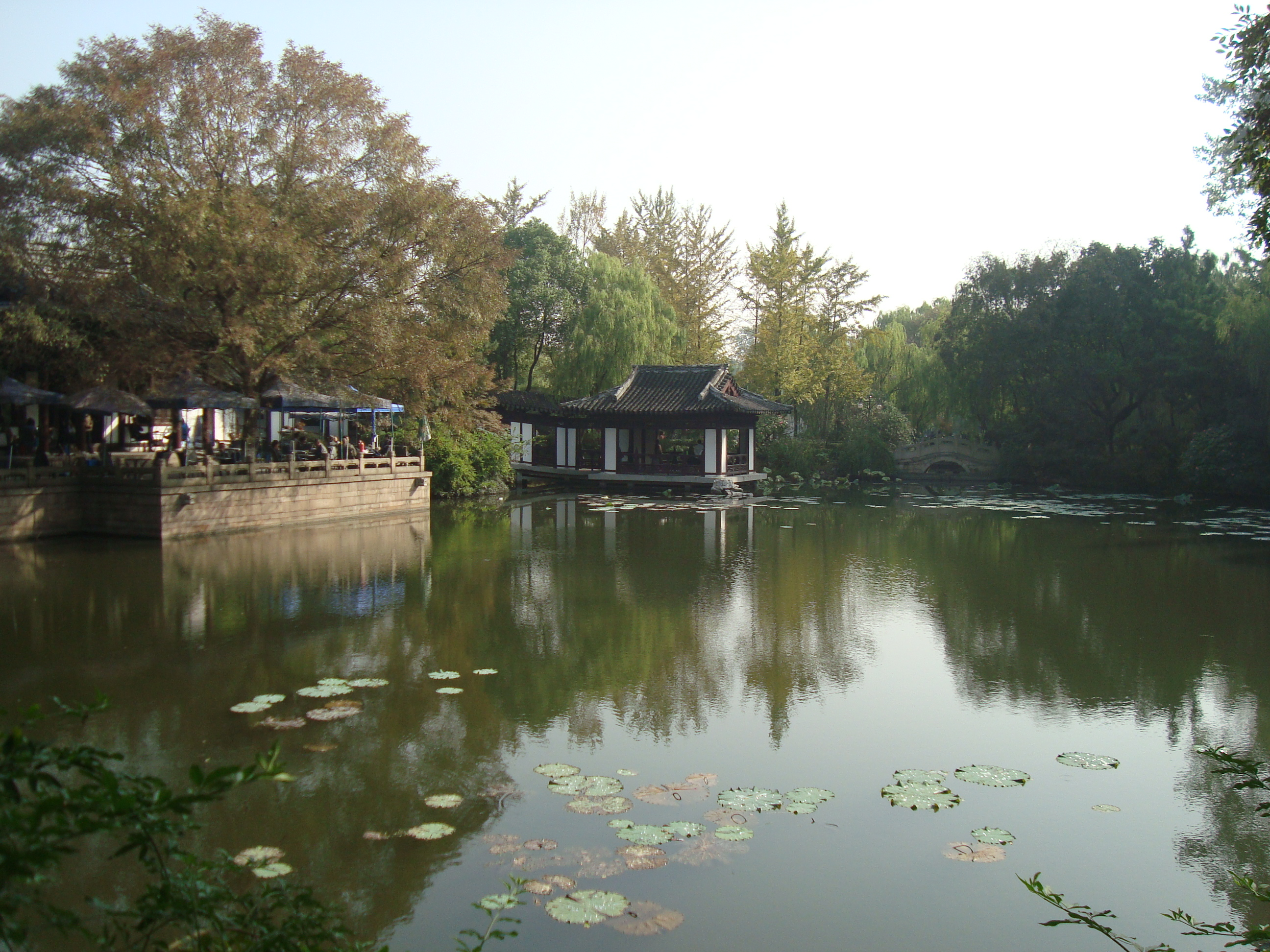 浙江省湖州市蓮花莊一隅，遠處即「鷗波亭」